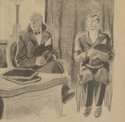 Léo Saint-Clair et Gnô Mitang illustrés par Henry Fournier pour Le Roman d'une nuit de Jean de La Hire. Parution dans Les Ondes du 19/10/1941.